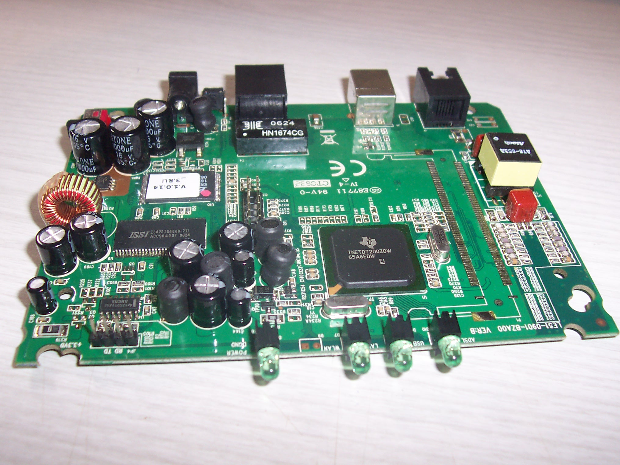 Плата модема Acorp LAN 120M